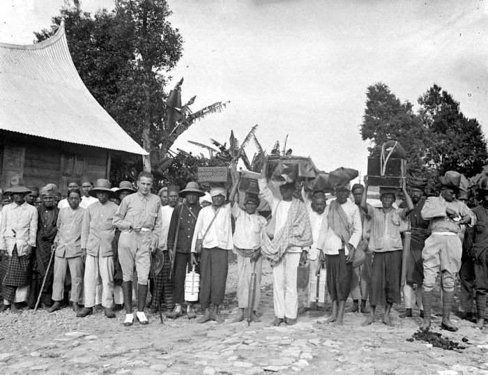 Negatief. Het 'tourneren' (op tournee gaan) werd doorgaans aan een lagere ambtenaar overgelaten meestal een controleur BB (Binnenlands Bestuur). Dat was niet zelden een ingewikkelde en tijdrovende zaak, vooral in de meer onherbergzame streken, omdat er vanwege het gebrek aan goede wegen dragers mee moesten. In dit geval telde het gezelschap ook militairen, vermoedelijk omdat er juist in het jaar van de foto (1926) een opstand onder de bevolking was uitgebroken. Zo'n tournee was deels een ceremoniële gebeurtenis, koloniaal vlagvertoon, waarbij in ieder dorp de datuk (dorpshoofd) en de ulama (Islamitisch geestelijke) met de controleur uitvoerig delibereerden over rust, orde en belastingen. (P. Boomgaard, 2001). Europese bestuursambtenaar op doorreis aan de Sumatraanse Westkust Bestuursambtenaar op tournee, Sumatra's Westkust, Midden-Sumatra, 1926